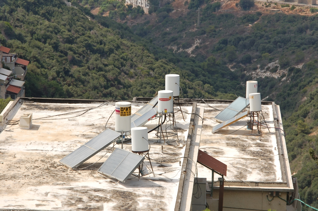 Haifa City 2011